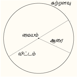 Circle 1